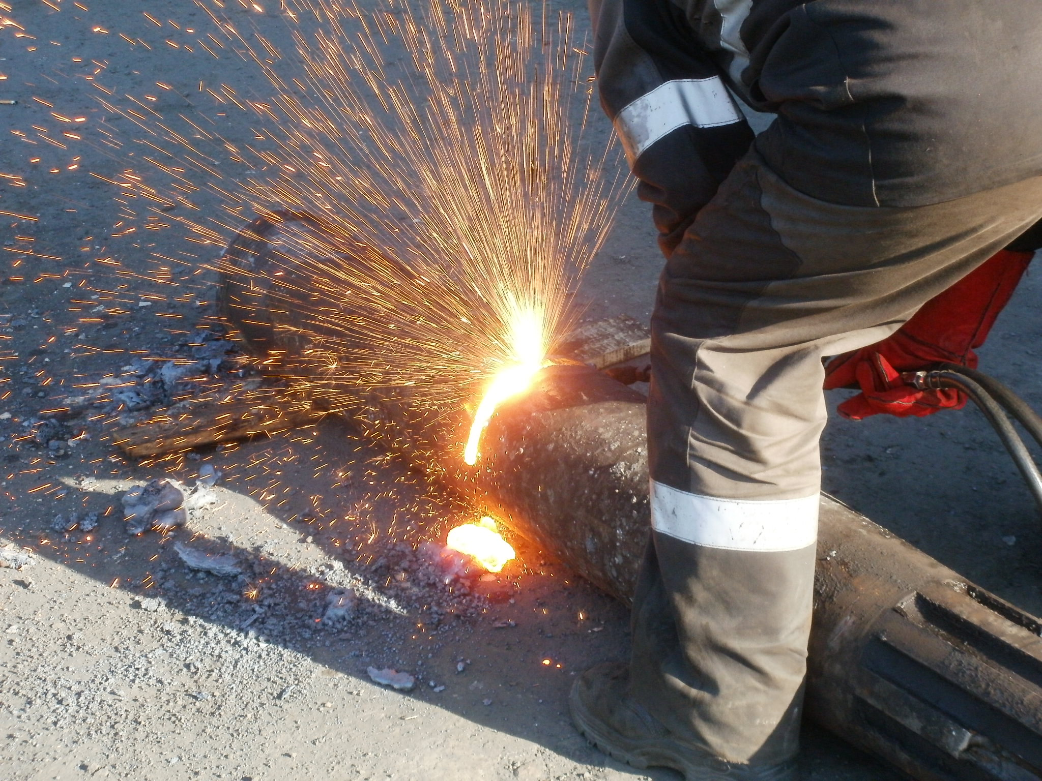 Резка вала газовым резаком на металлургическом предприятии.